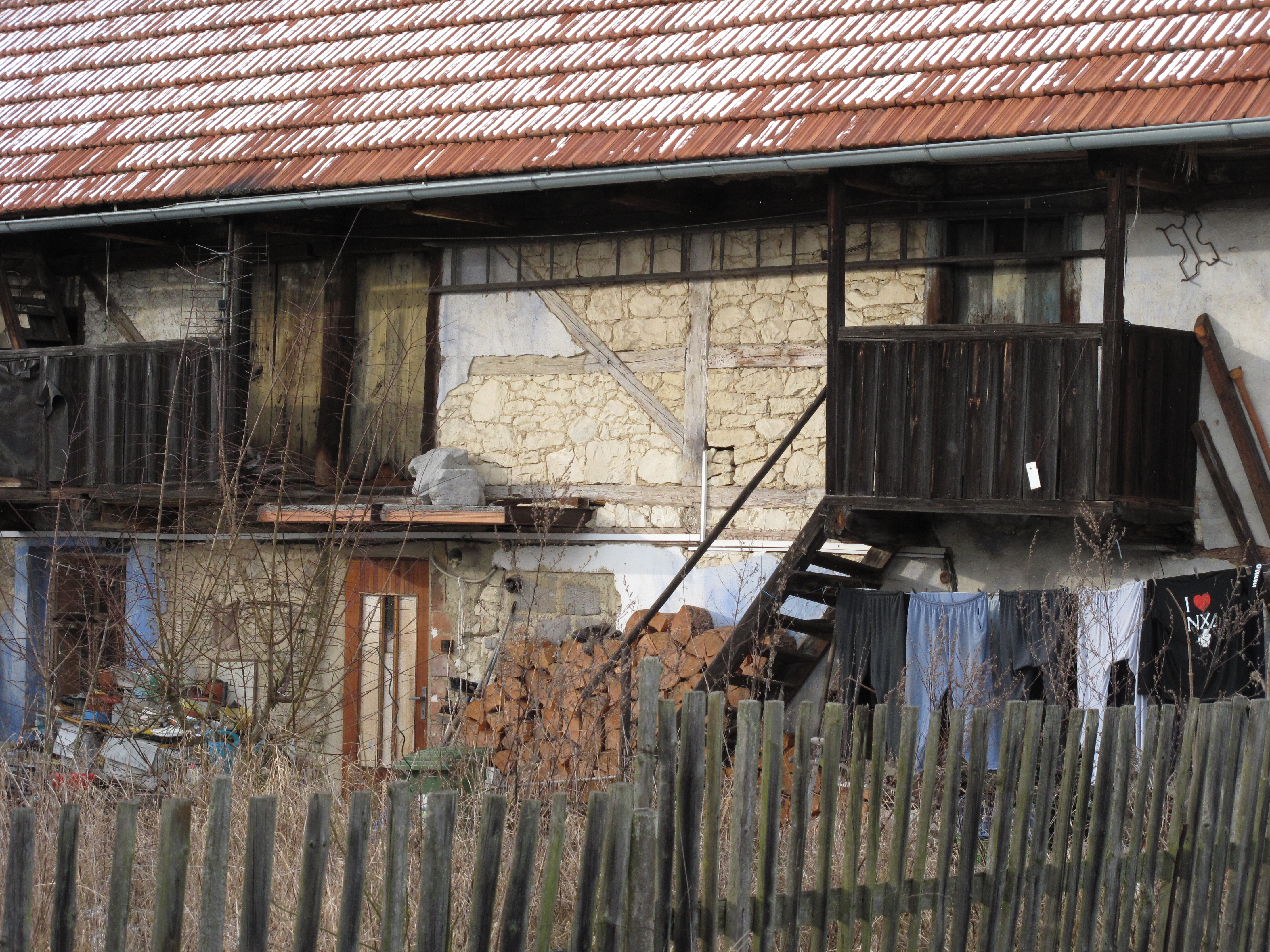 Hrázděný dům v Přerubenicích. Okres Rakovník, Česká republika.